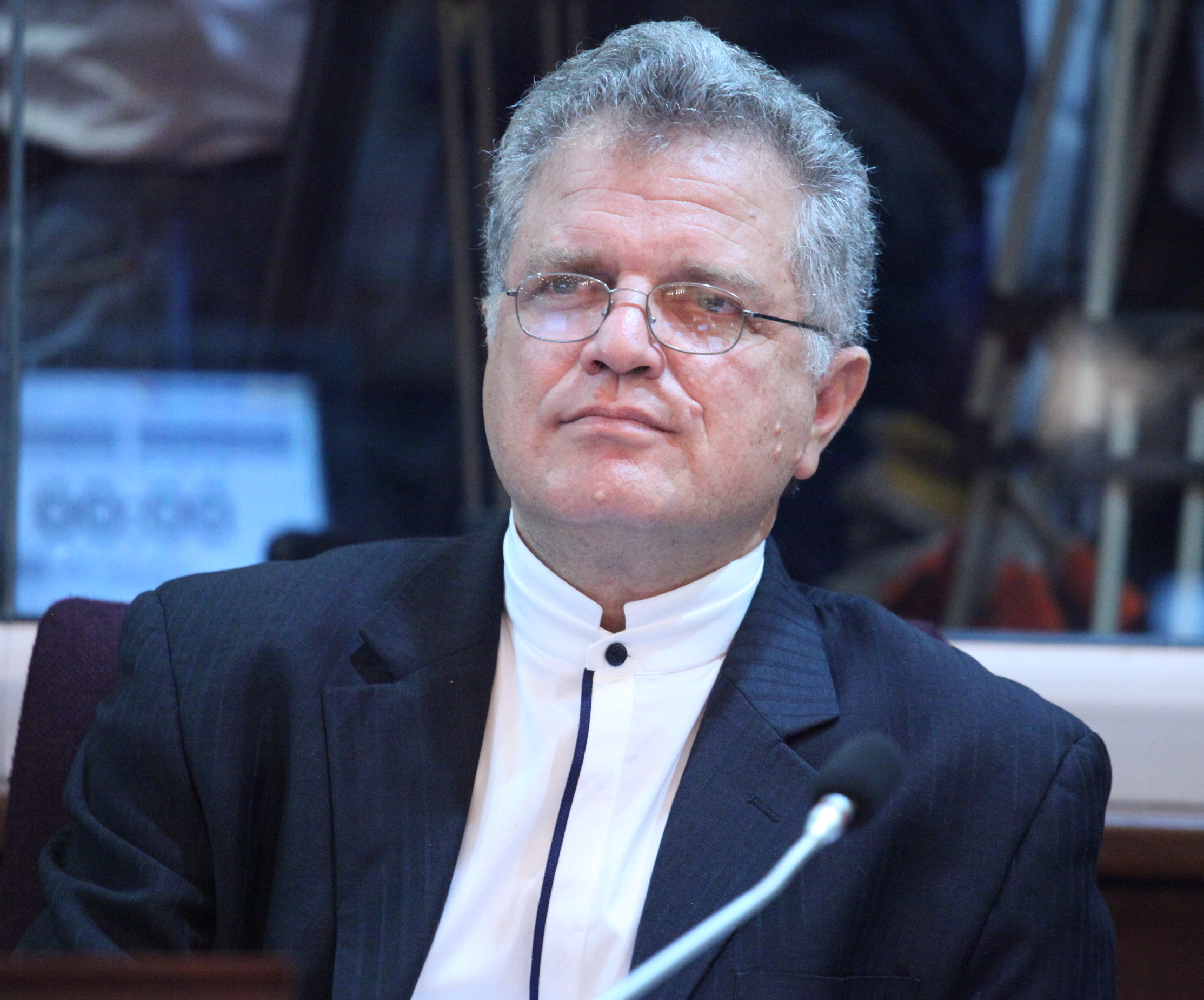 Foto: Hugo Ortiz Ron / Asamblea Nacional